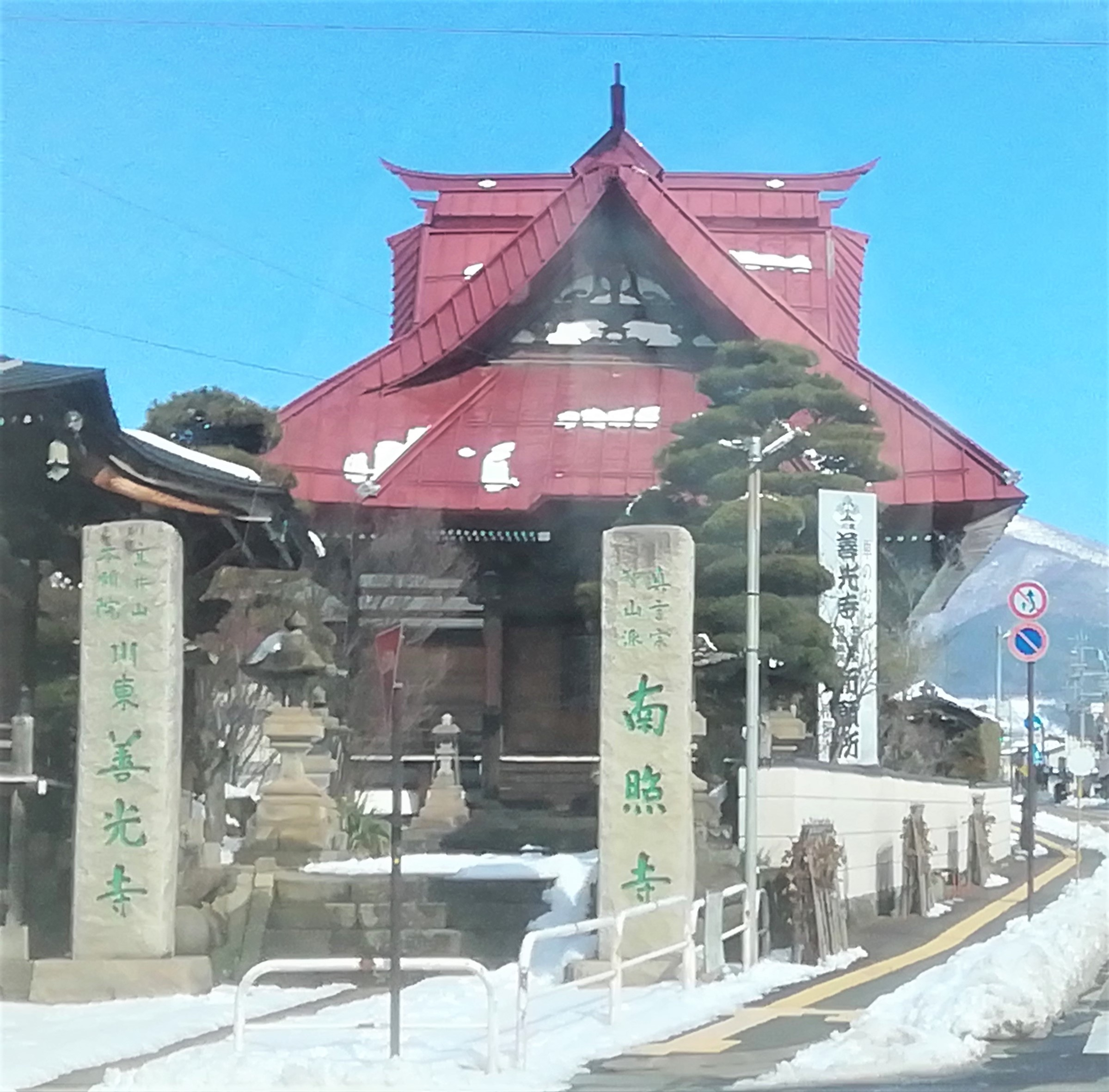 南照寺（川東善光寺）2020-2-12